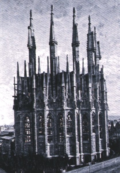 El ábside de la Sagrada Familia en 1893.